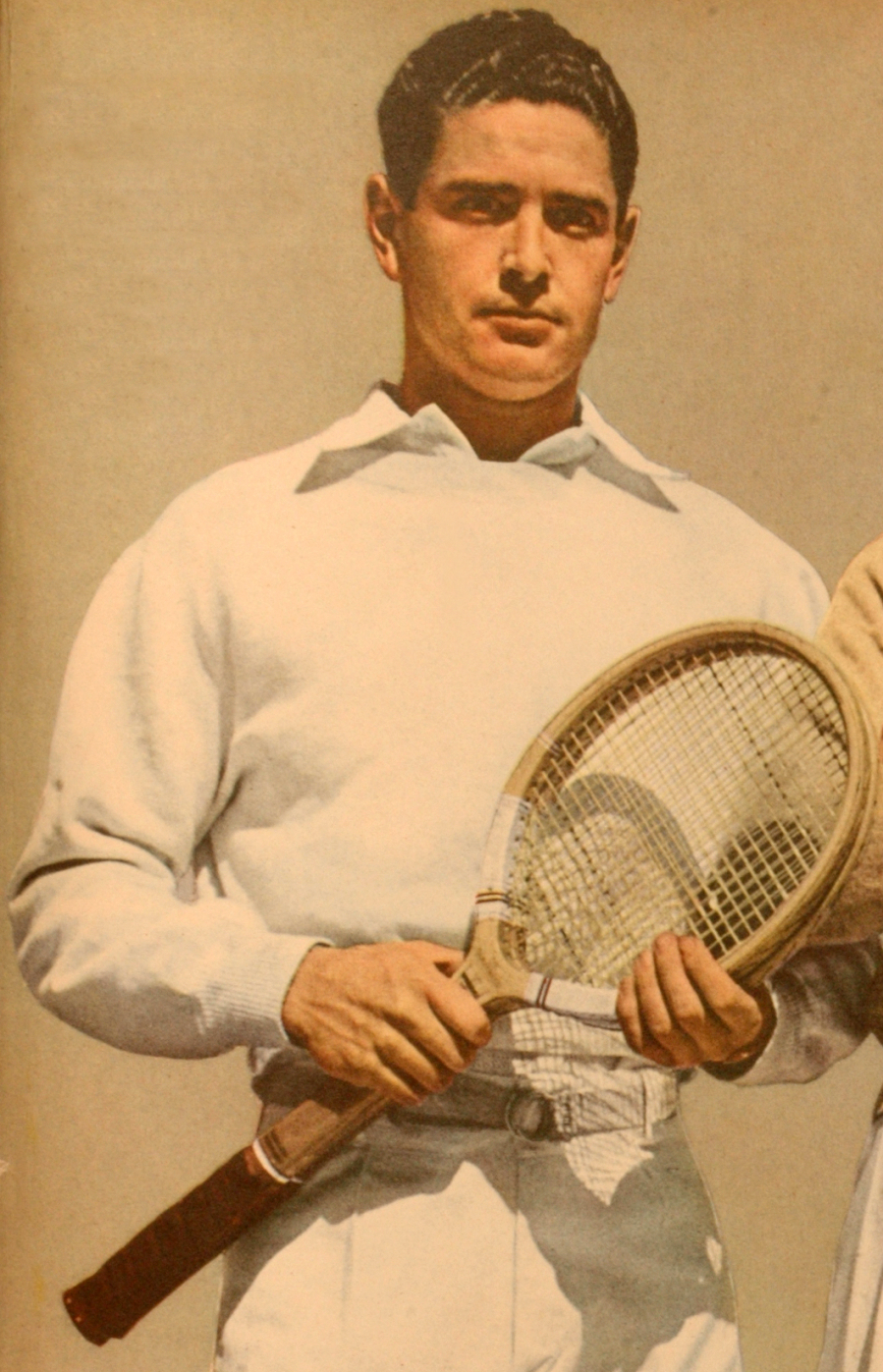 El Grafico del 04 de Diciembre de 1942. Edicion 1221